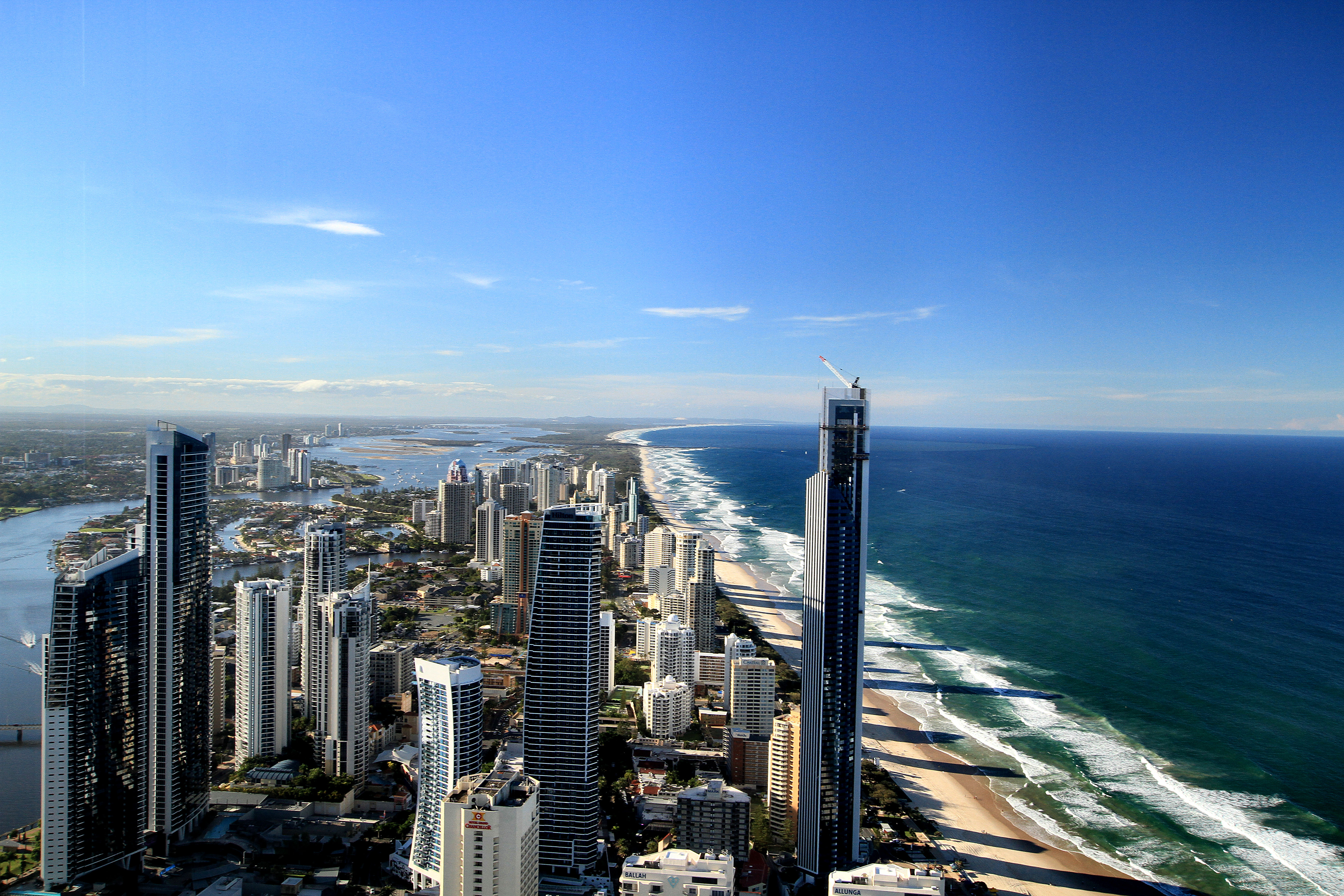 Surfers Paradise